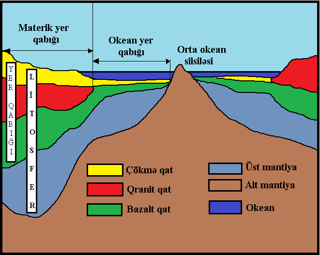 Yer qabığının quruluşu